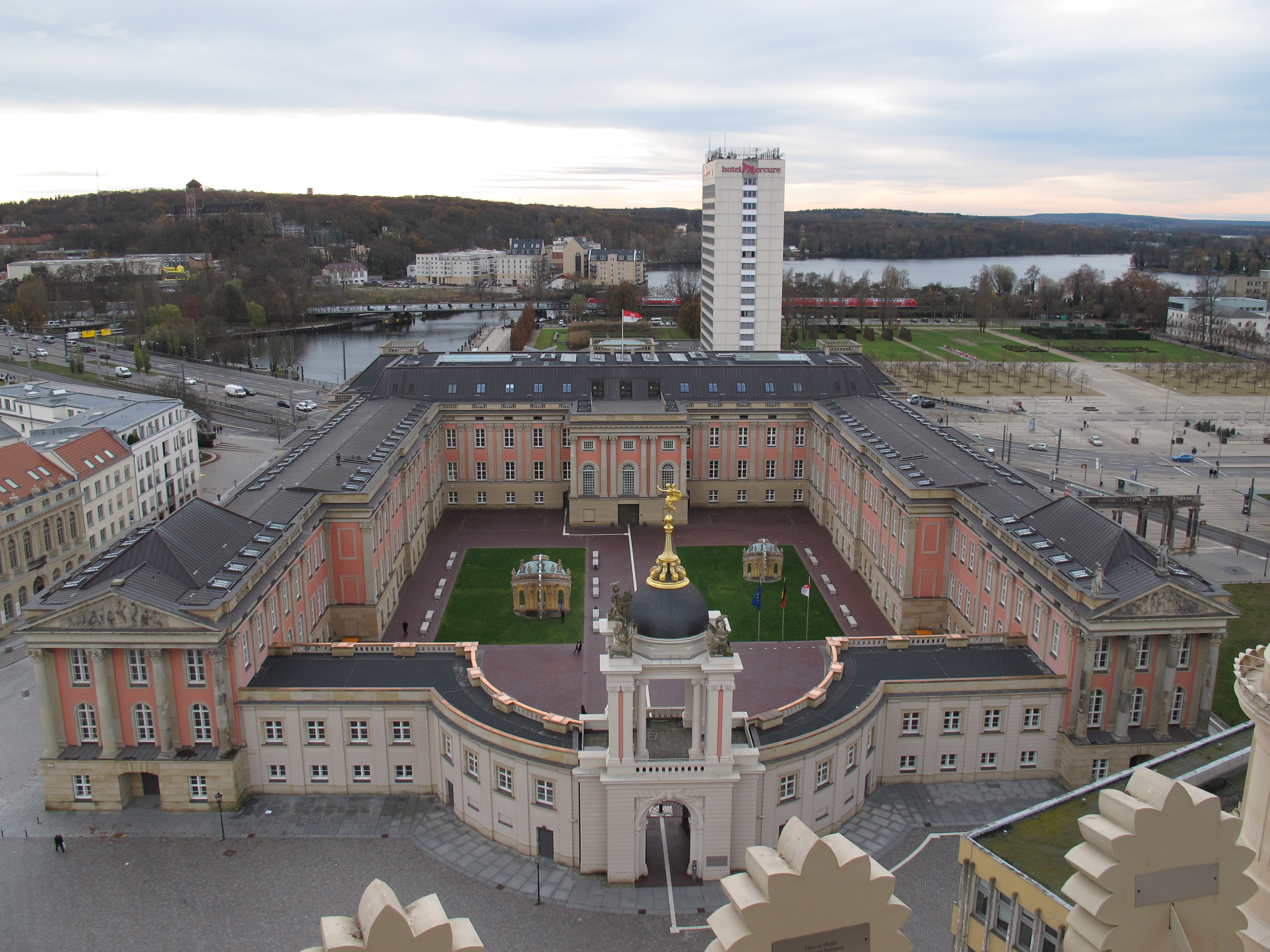 Das Stadtschloss Potsdam von der Nikolaikirche aus gesehen. Im Hintergrund das Hotel Mercure.